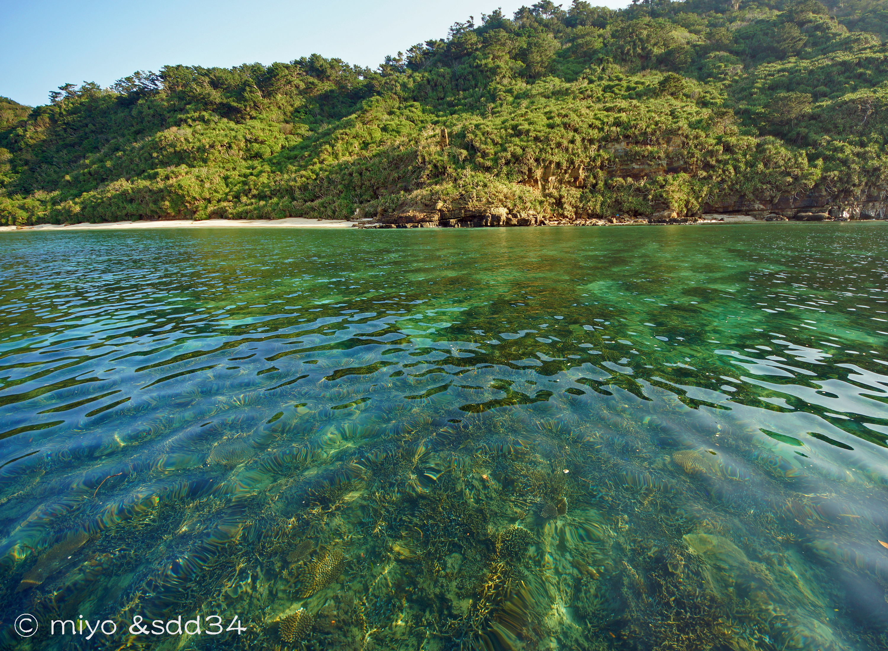 内離島坑口（正面浜辺の岩の左側、右側は水浴び場所）、内離島送風用煙突（正面中央部の突起）